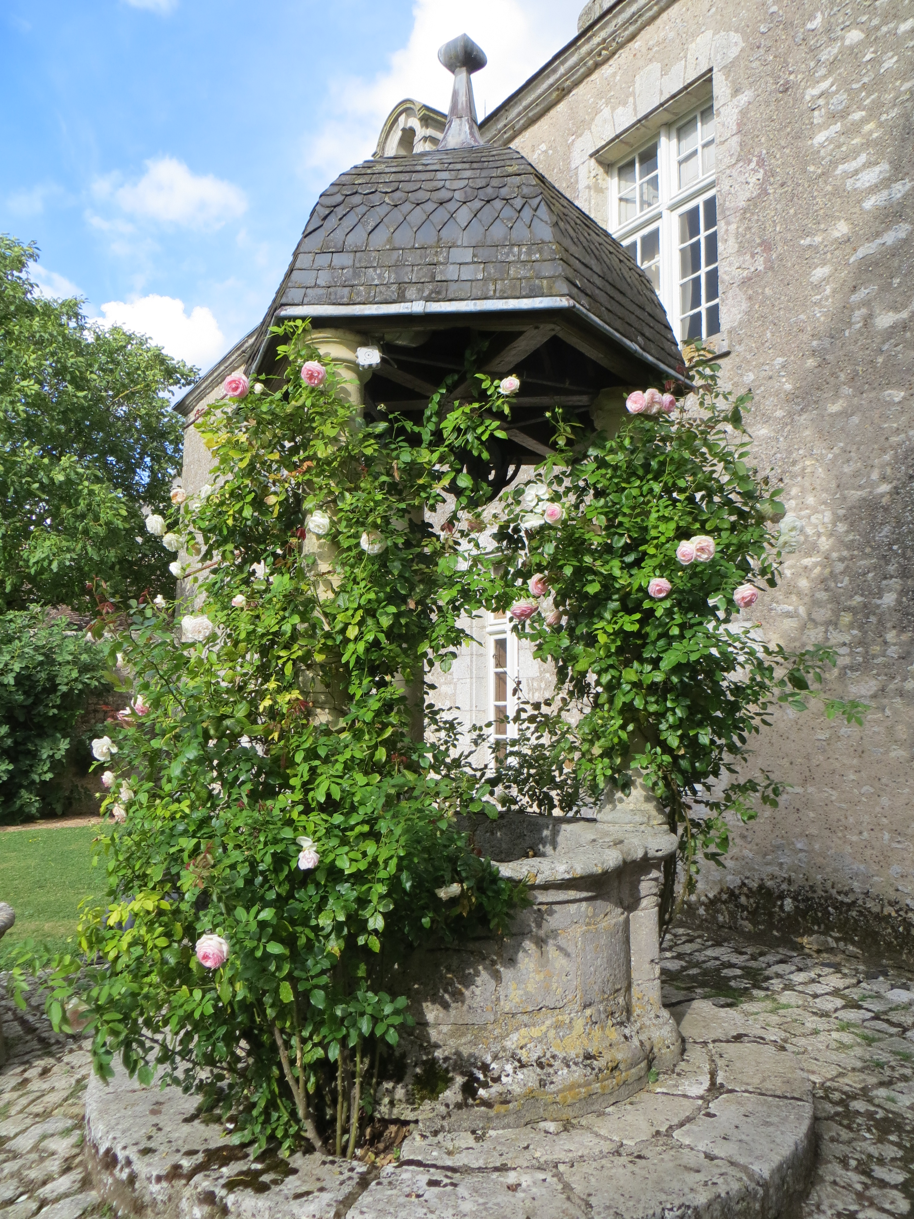 Puits du Château de Talcy, situé devant l'aile Est. .